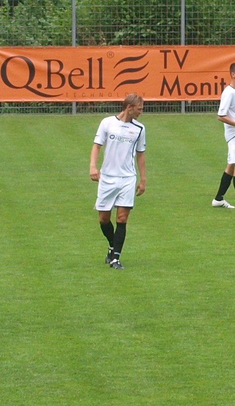 Ekstrand con la maglia dell'Udinese